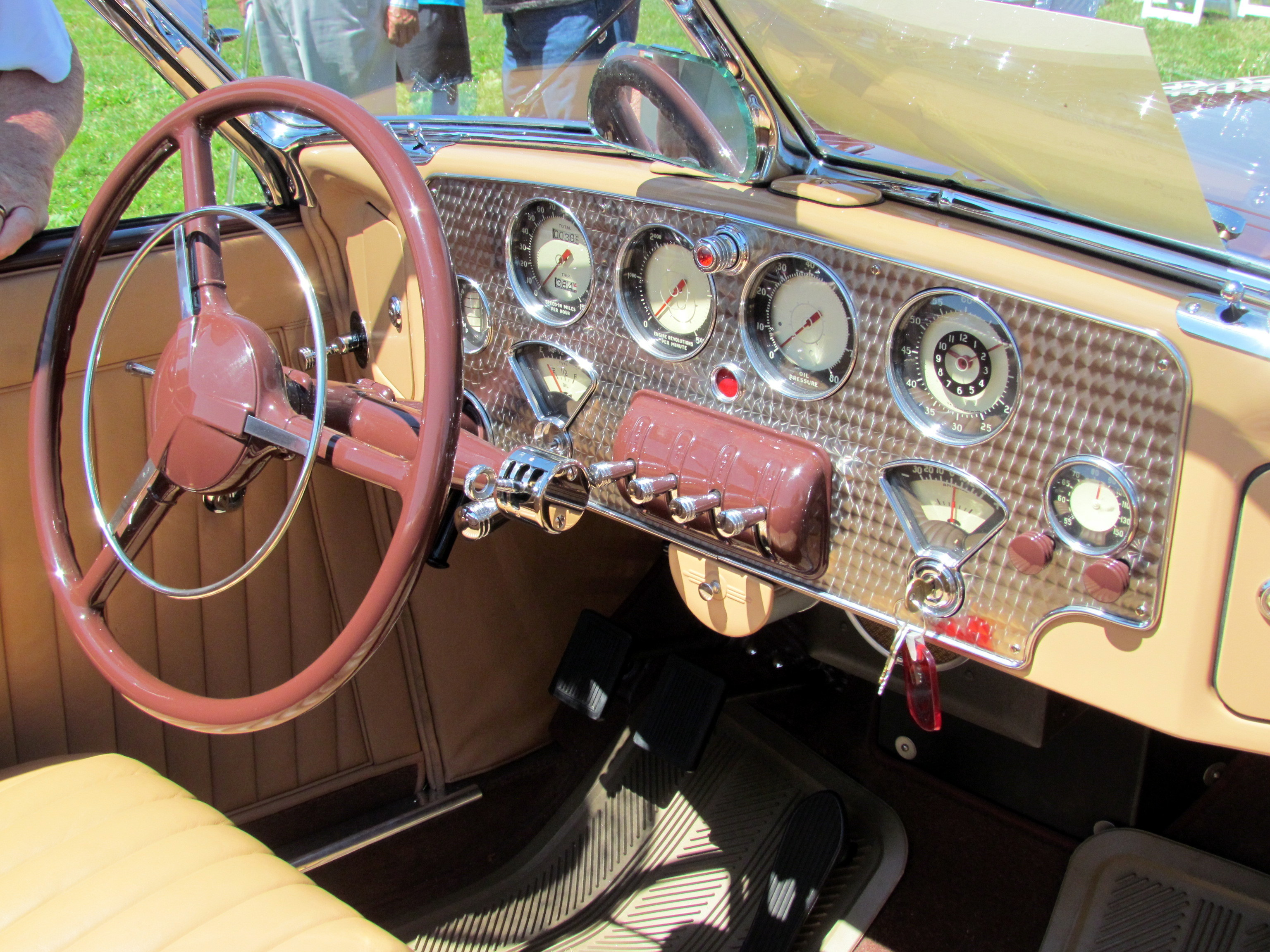 1937 Cord 812 SC Cabriolet Marin-Sonoma Concours d'Elegance 2012